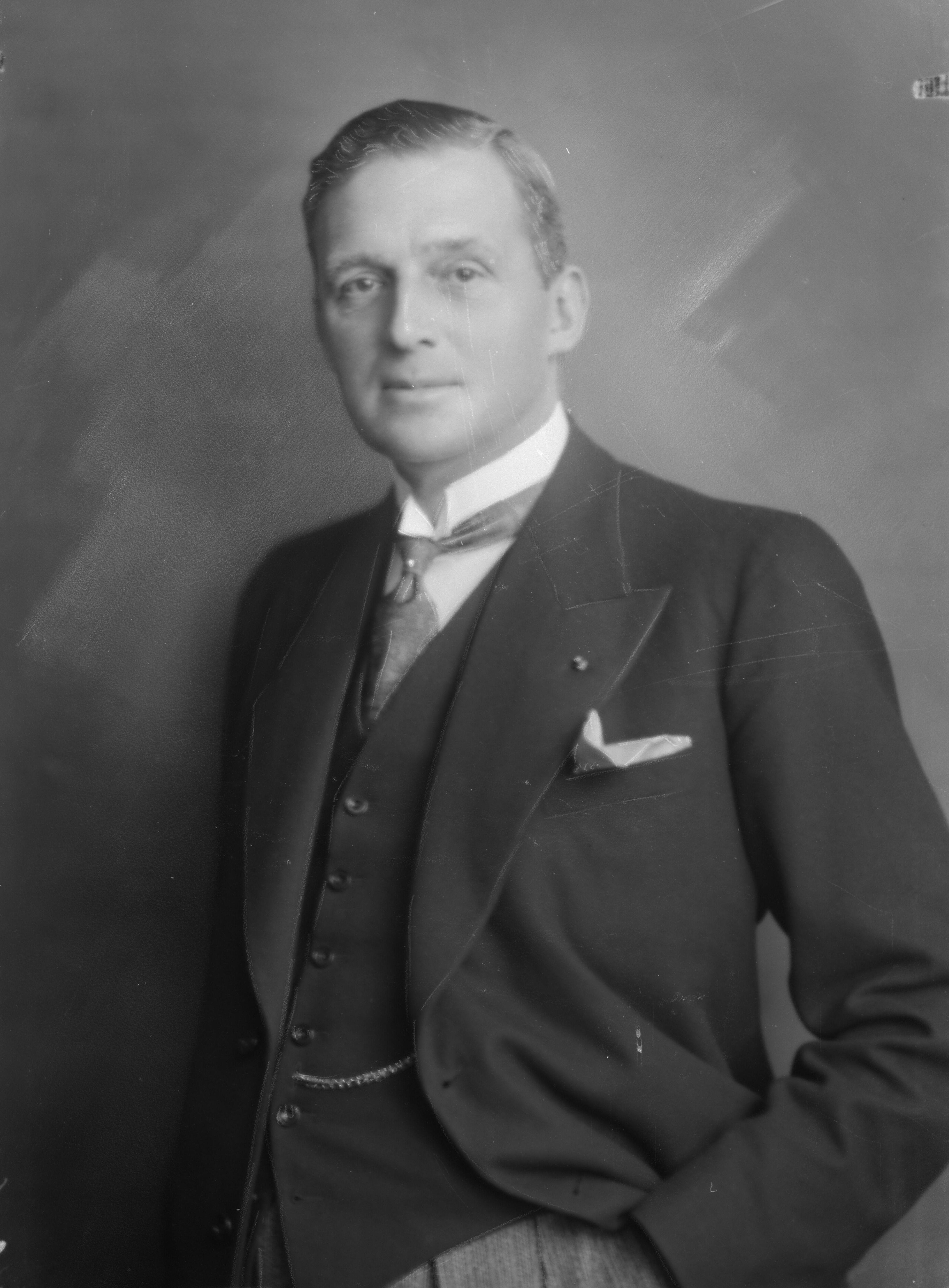 Beschrijving Portret van de heer W.C. Wendelaar. Red Een Portret: Willem Carel Wendelaar staat in 1916 op de foto in een militair uniform. In 1927 gaat hij eveneens in uniform op de foto, maar dan met zijn pas ontvangen onderscheiding van Officier in de Orde van Oranje-Nassau en met zijn ambtsketen. Hij is een derde keer bij Merkelbach op de foto gegaan in 1930, ditmaal gewoon in pak. Voorzitter van de Vereniging van Effectenhandelaren. Documenttype foto Vervaardiger Merkelbach, Atelier J. Collectie Collectie Atelier J. Merkelbach Inventarissen Afbeeldingsbestand 010164033012 Generated with Dememorixer